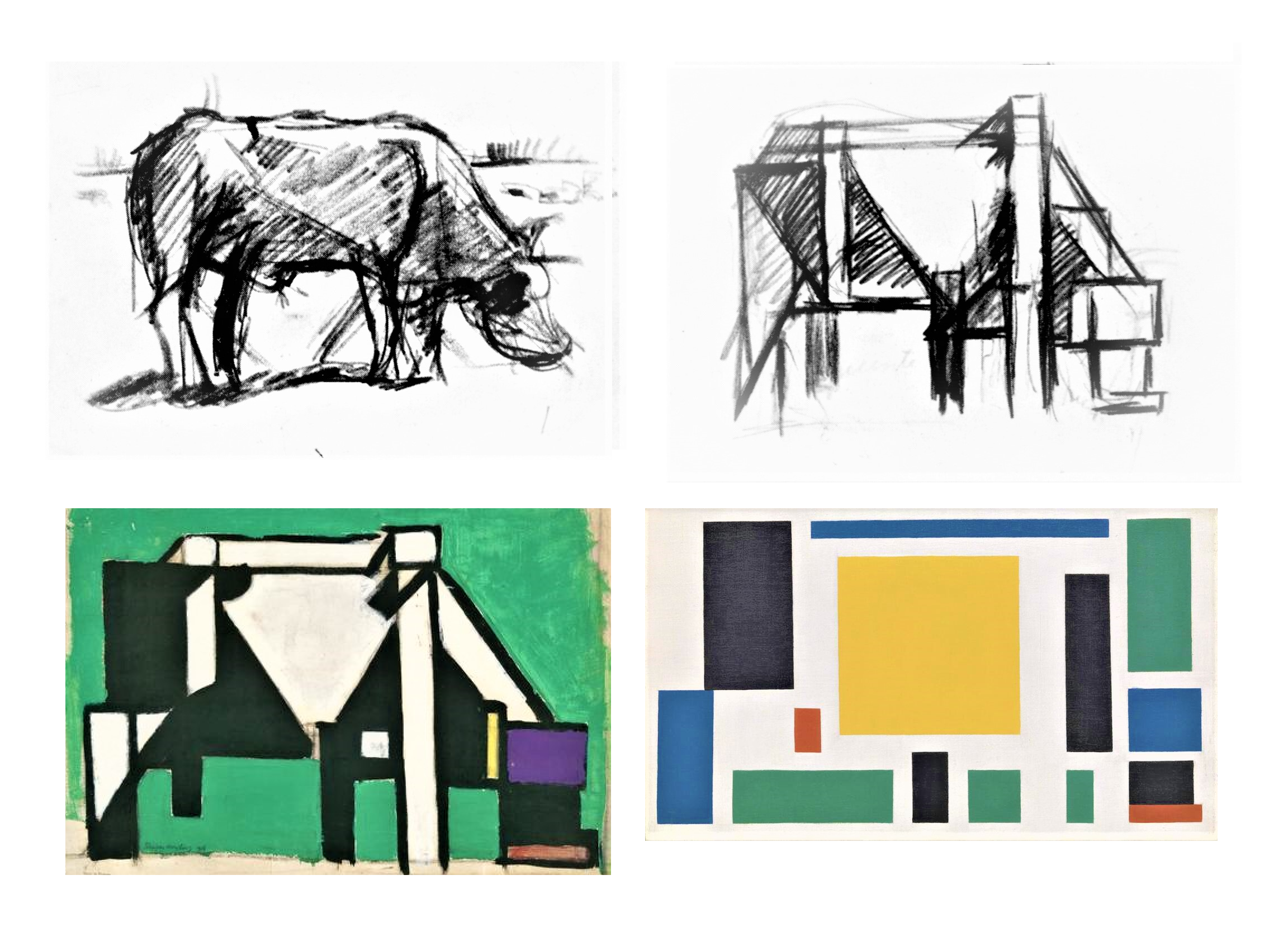 Theo van Doesburg, série : La vache, vers 1918 (images Commons modifiées)